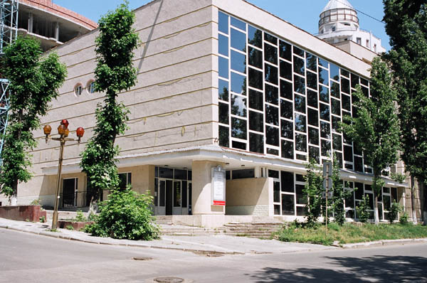 Здание Саратовского театра кукол «Теремок»